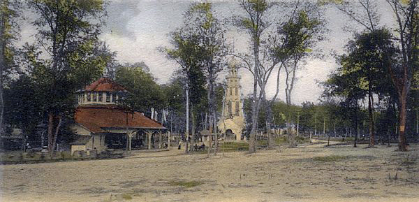 Miniature Railway at Monarch Park, Oil City (Pennsylvania)